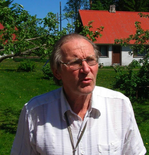 Raik Mikelsaar